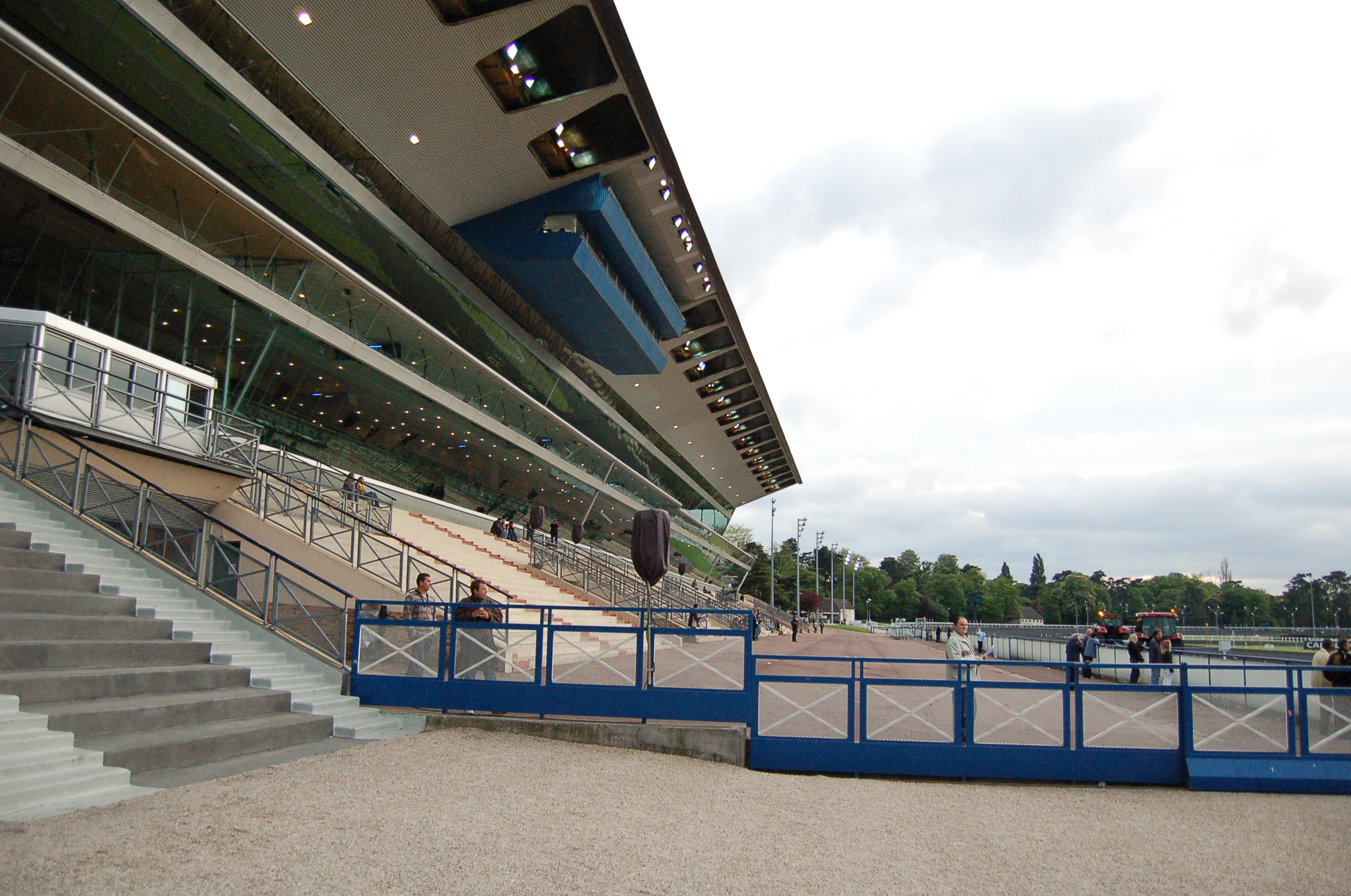 Tribune de l'Hippodrome de Vincennes.